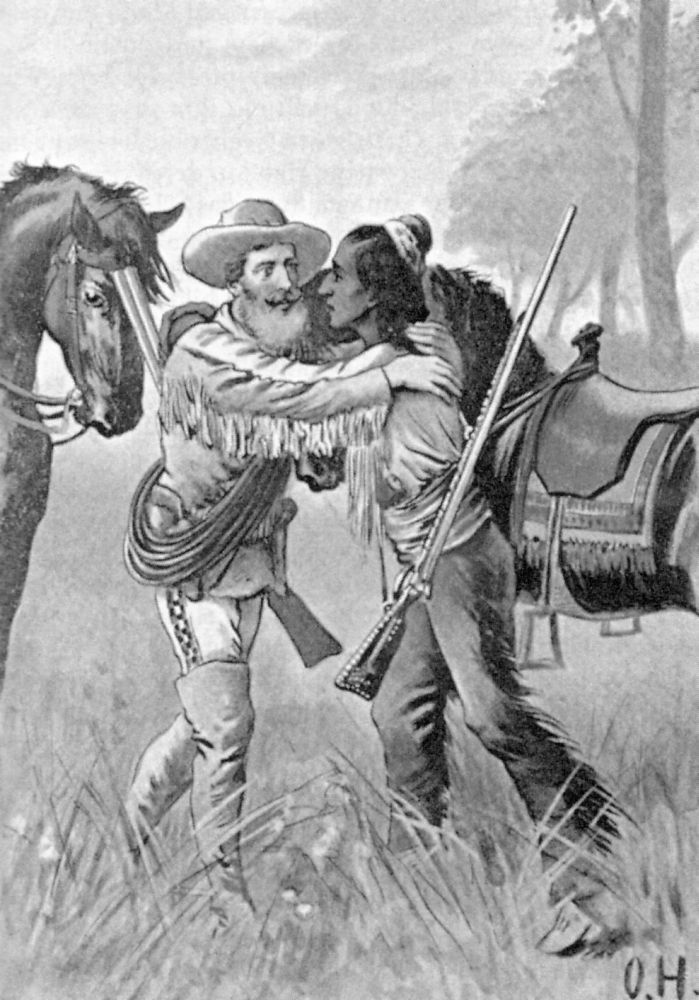 Illustration von Oskar Herrfurth zur 1897 veröffentlichten Buchausgabe der Erzählung Der Ölprinz von Karl May